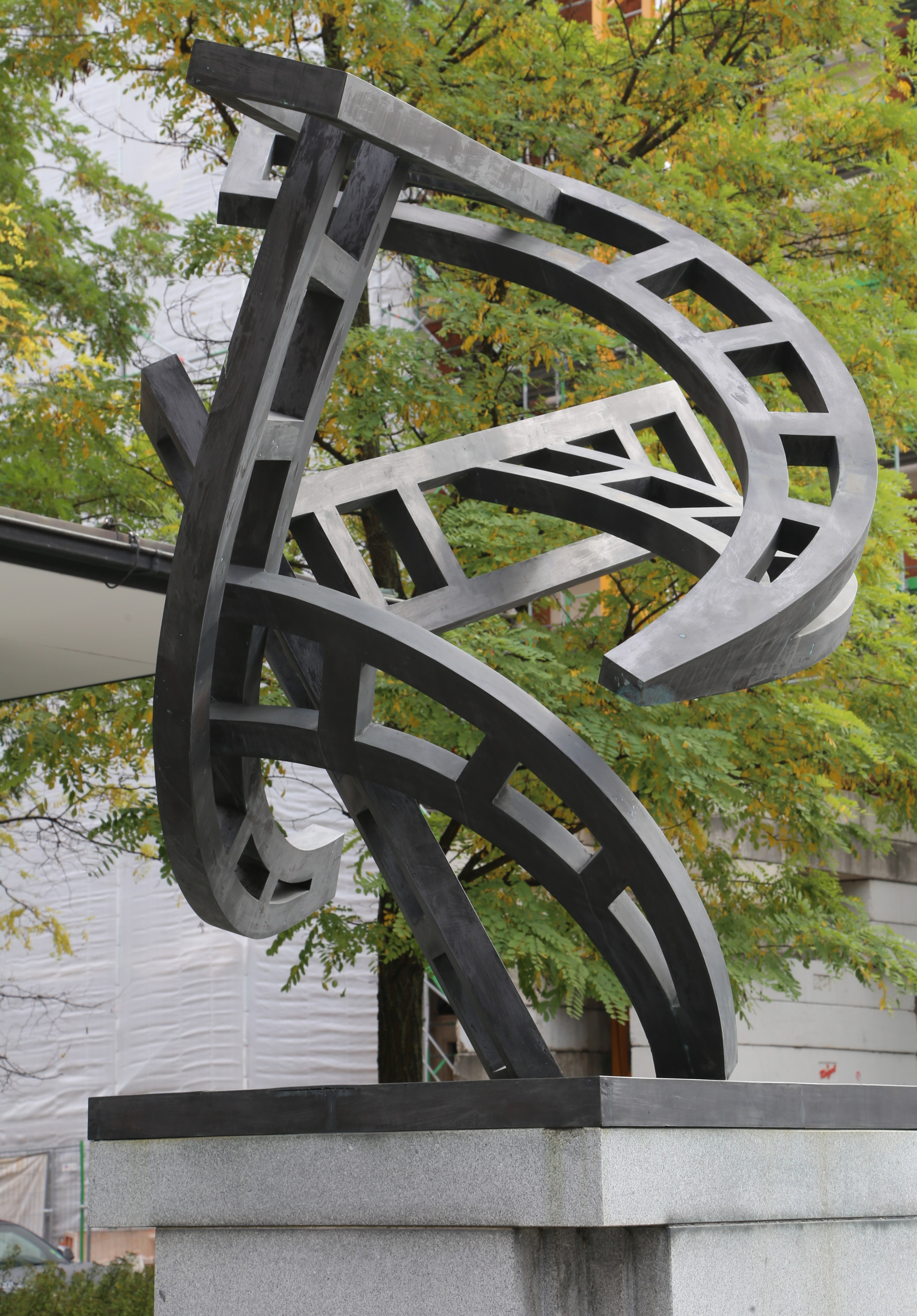 Manfred Bergmeister: Vernetzungen, 1993, Ottostraße, München